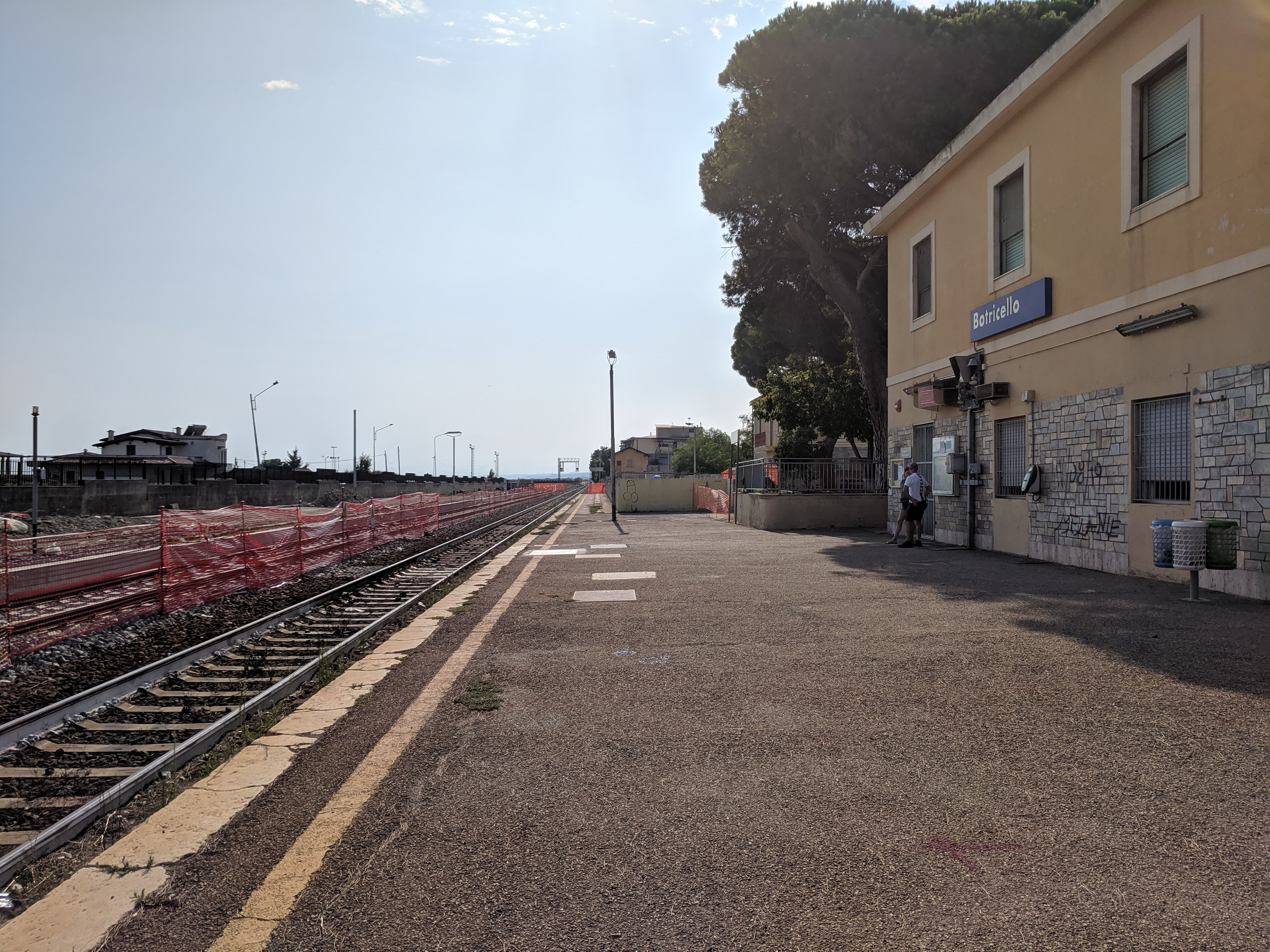 Vista binari della stazione di Botricello